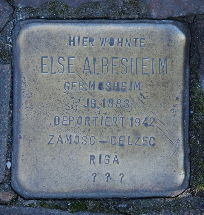 Stolperstein in Soest Waisenhausstraße 4, Else Albesheim